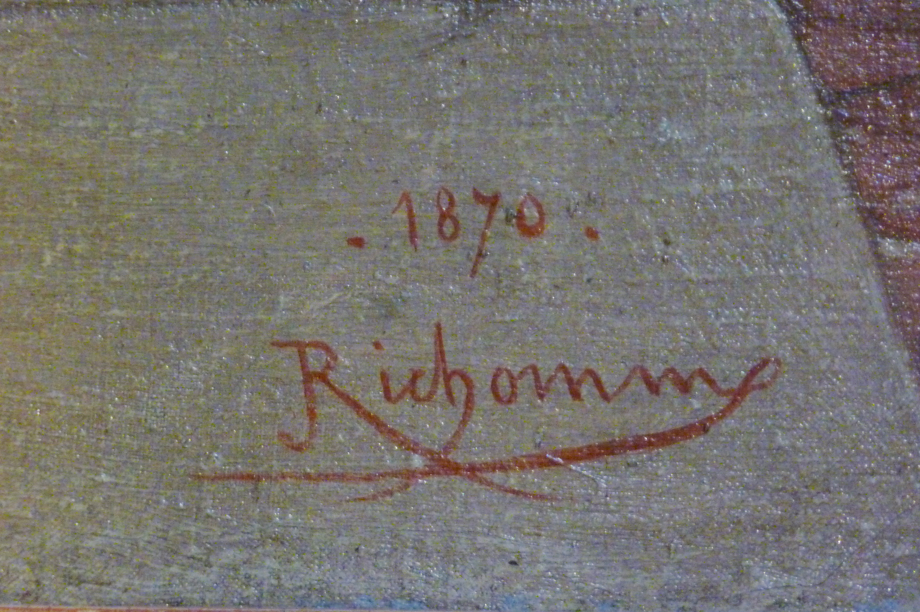 Katholische Kirche St-Paul-St-Louis im 4. Arrondissement in Paris (Île-de-France/Frankreich), Gemälde von Jules Richomme von 1870, Darstellung: Jesus und Joseph in der Zimmermannswerkstatt; Signatur: 1870 Richomme